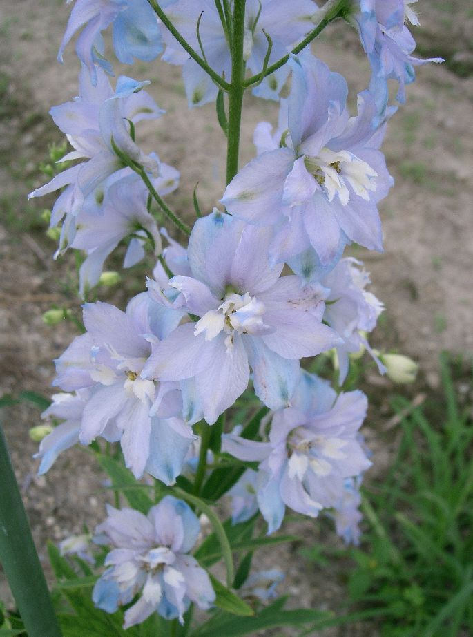 Delphinium sp.